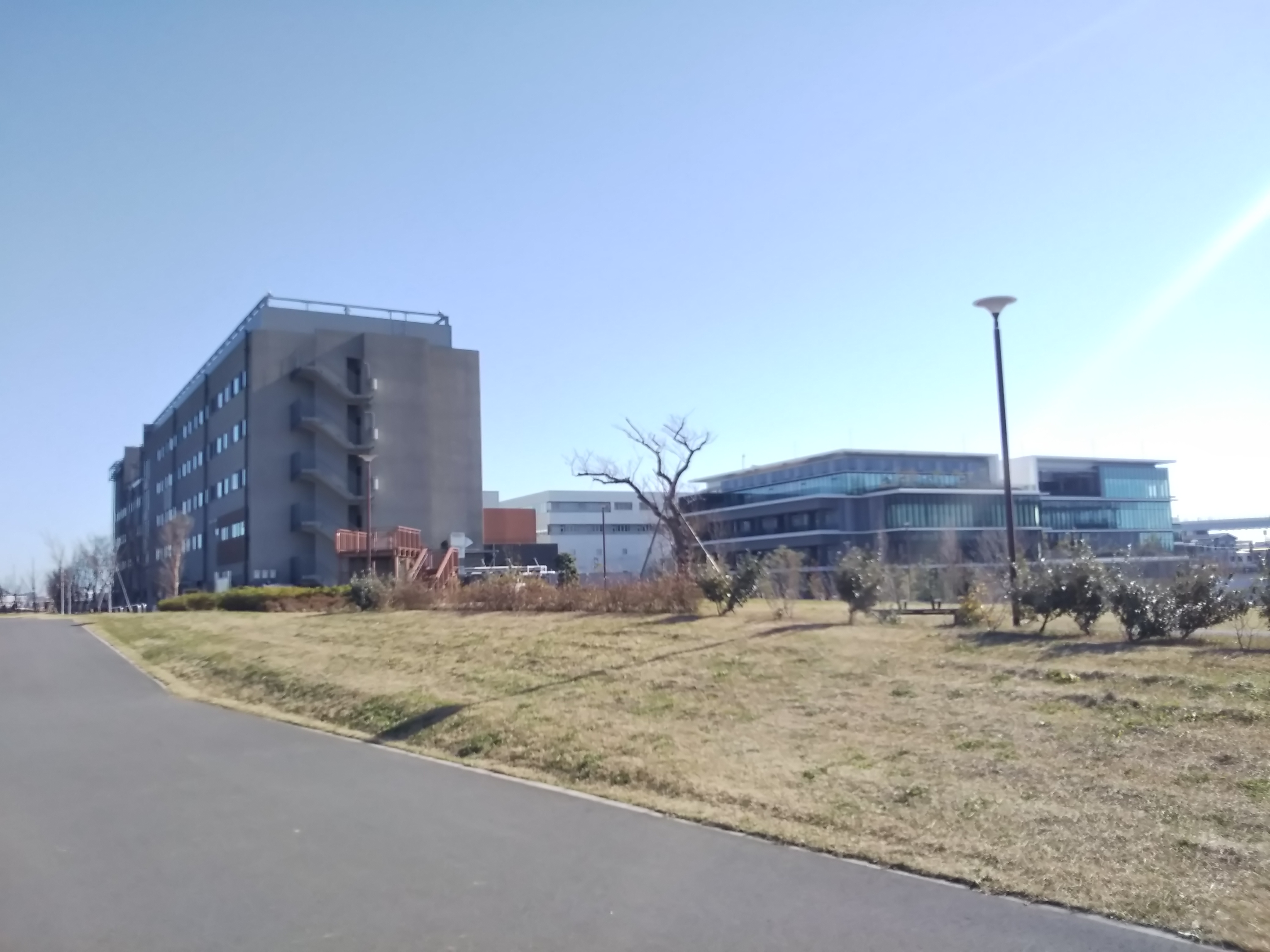 神奈川県川崎市川崎区殿町、キングスカイフロント